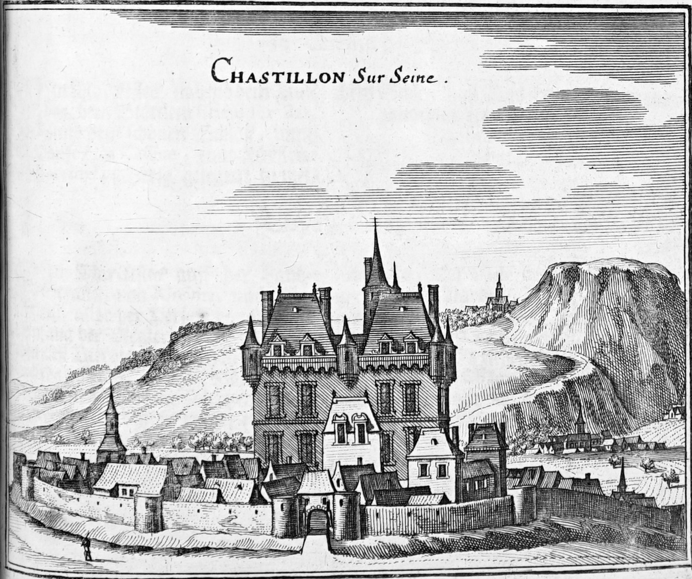 image présente dans le livre.